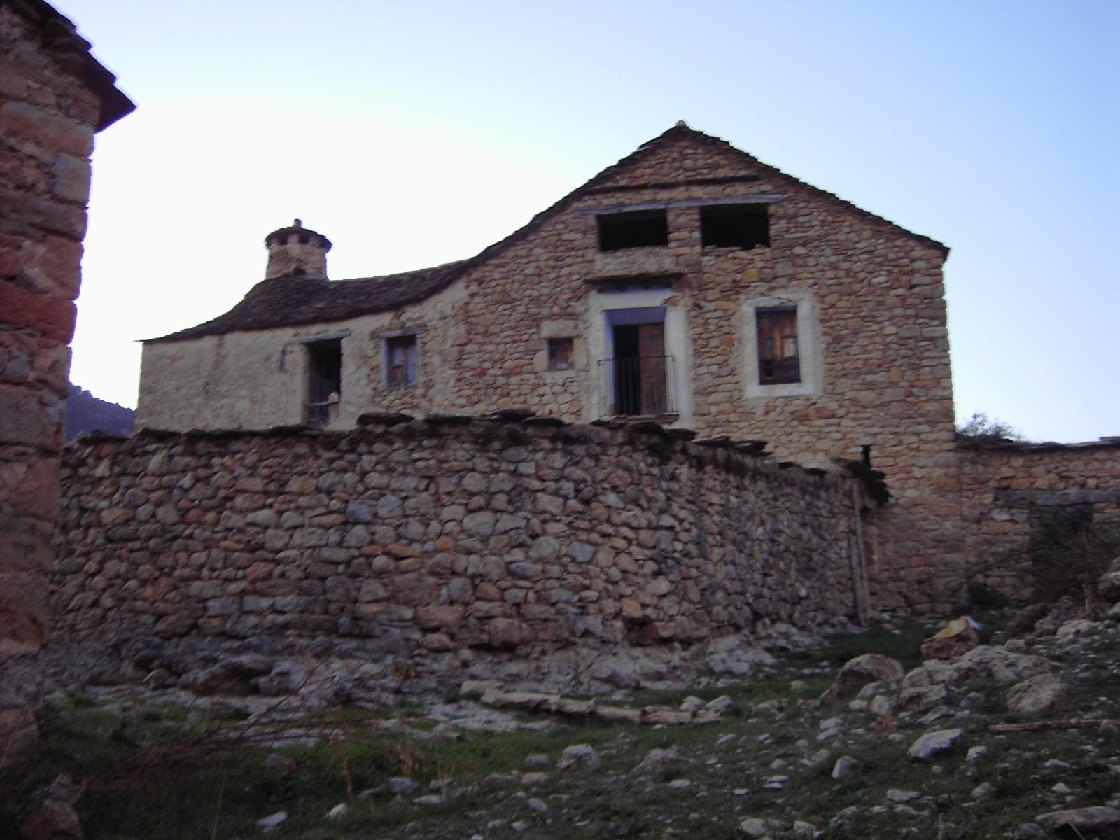 La última casa en pie de Silves con su corral cerrado al pie.